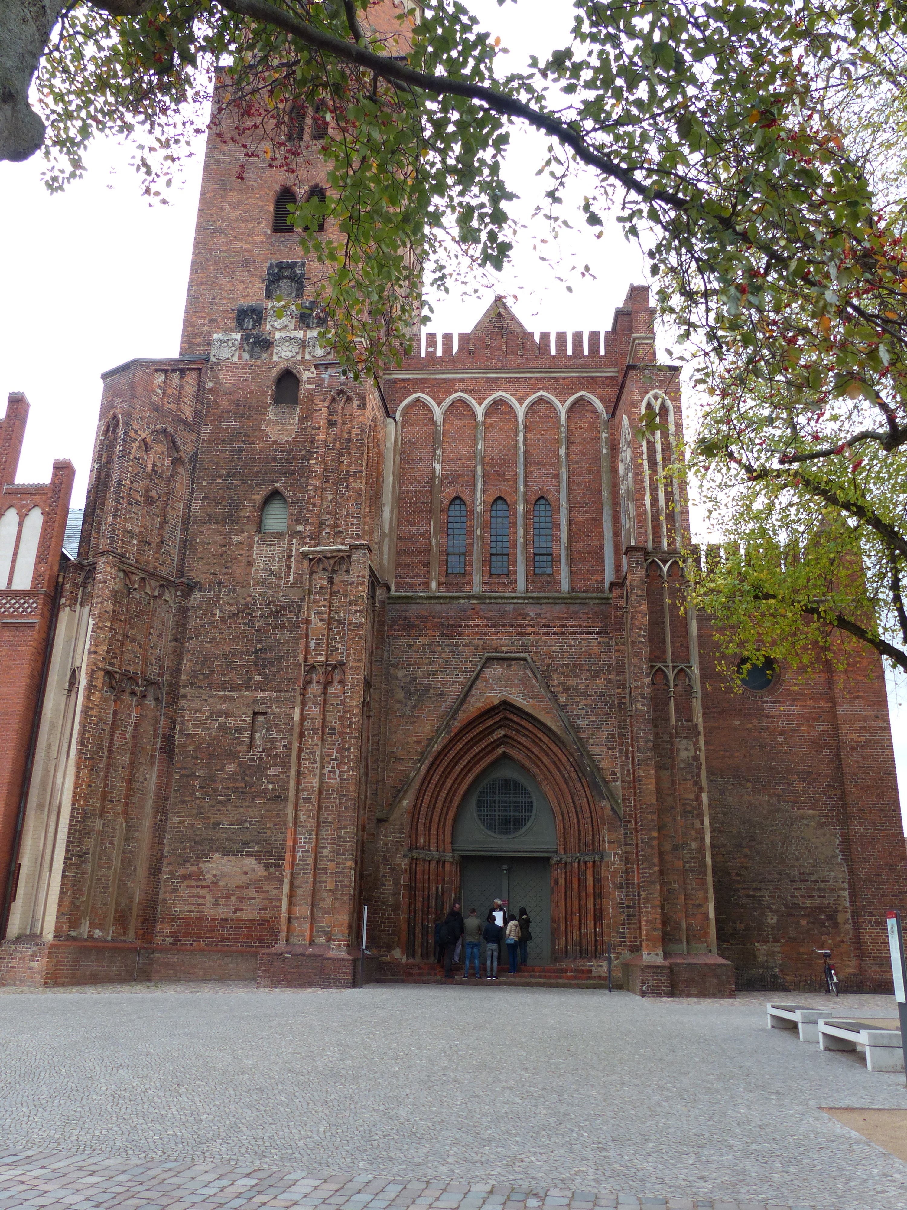 Westfassade des Brandenburger Doms